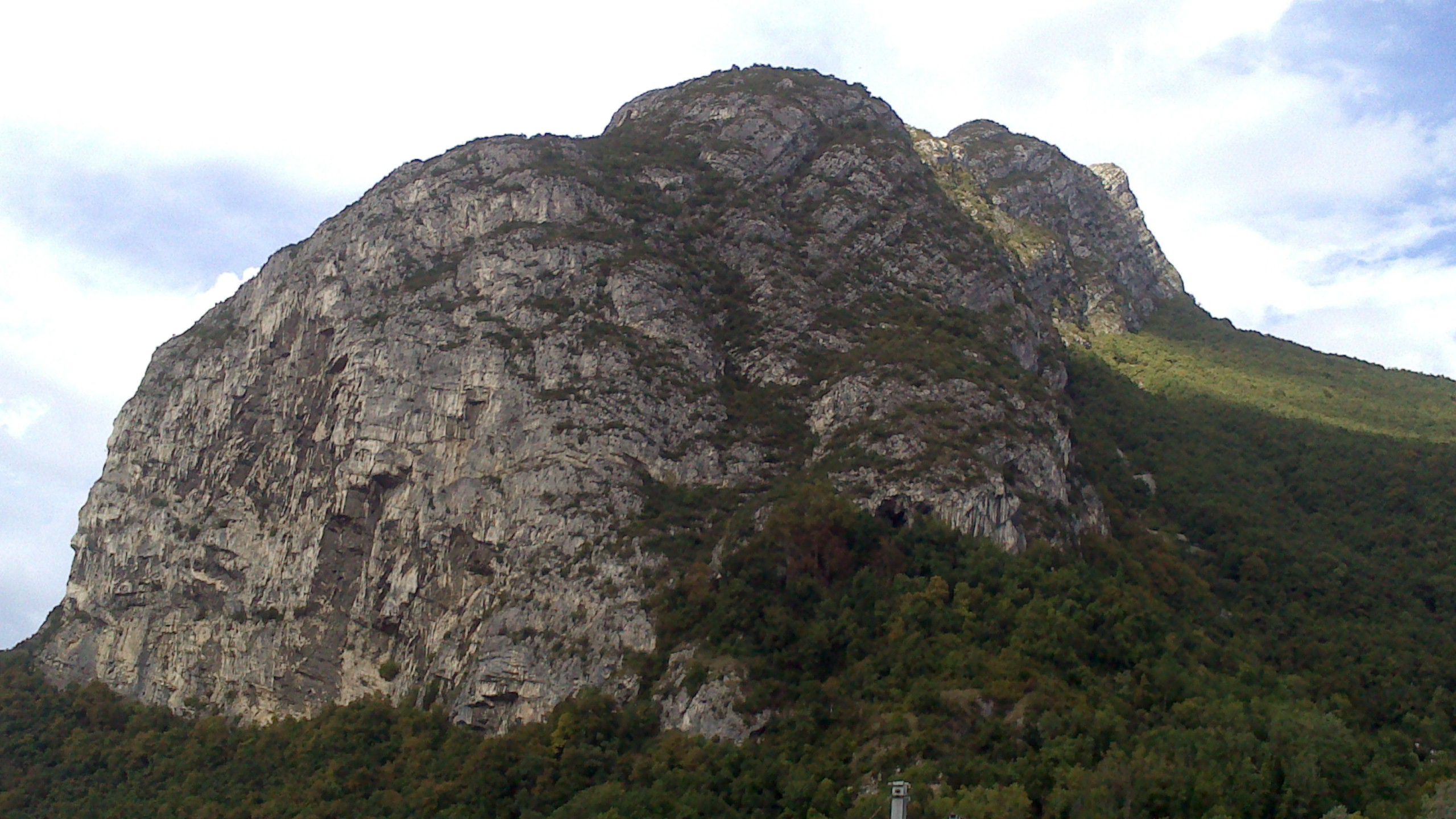 Néron : versant sud depuis la Buisseratte à Saint-Martin-le-Vinoux